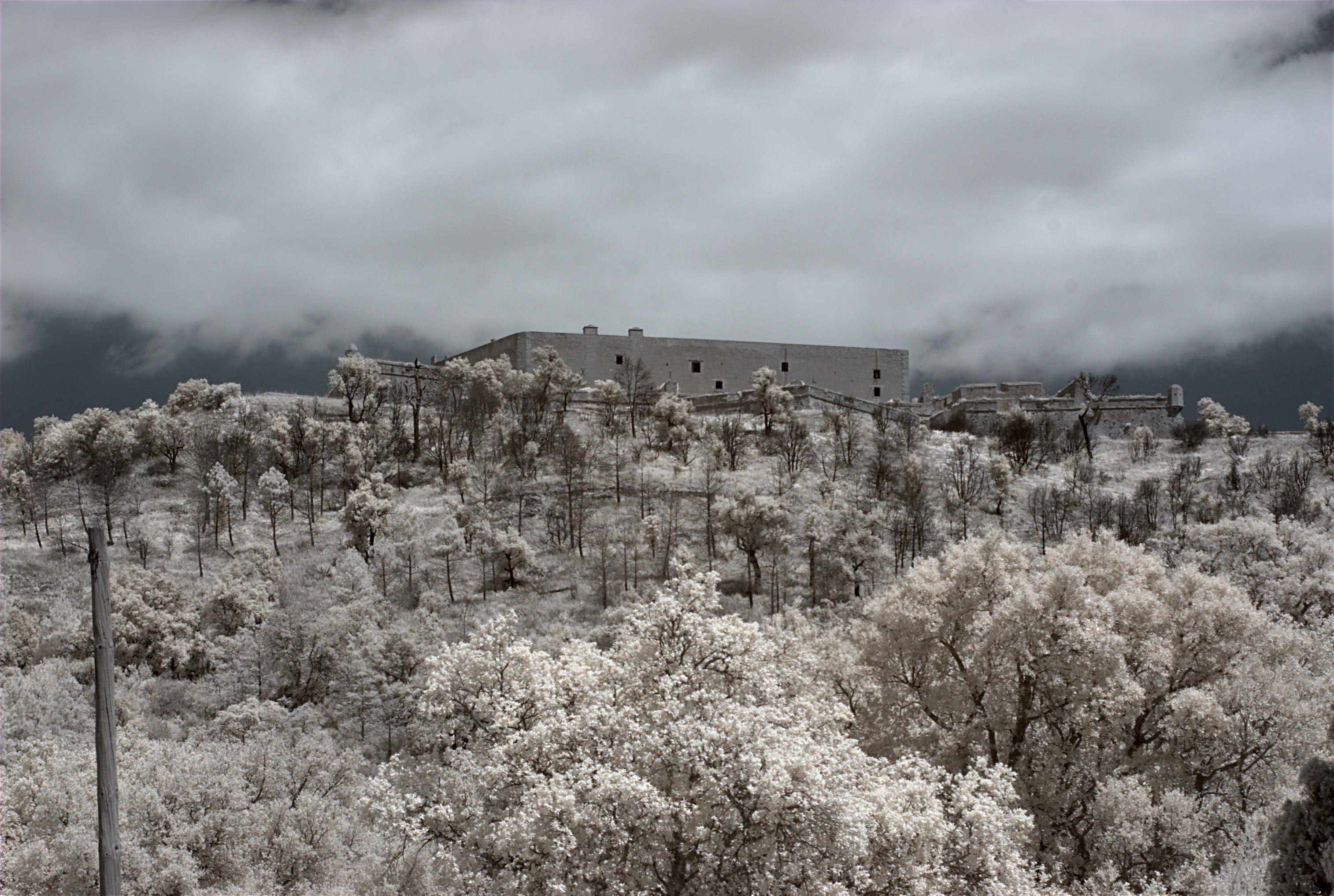 Fort de Bellegarde, Le Perthus (Pyrénées-Orientales, Languedoc-Roussillon, France) photographiée avec un filtre infrarouge 720 nm.